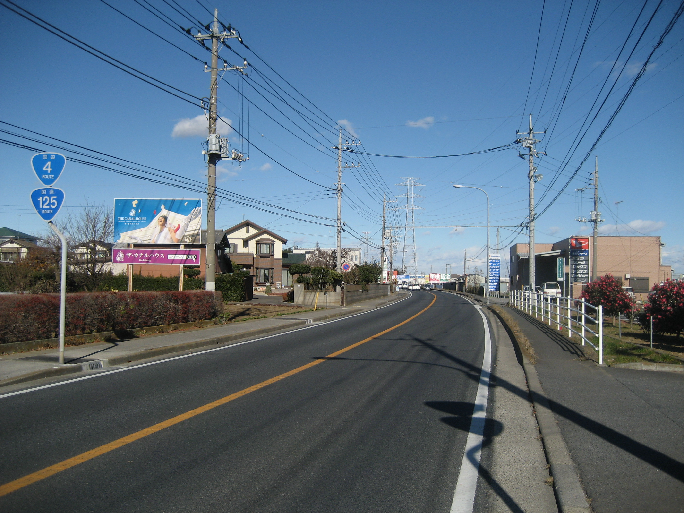 国道4号線古河バイパス茨城県古河市茶屋新田付近